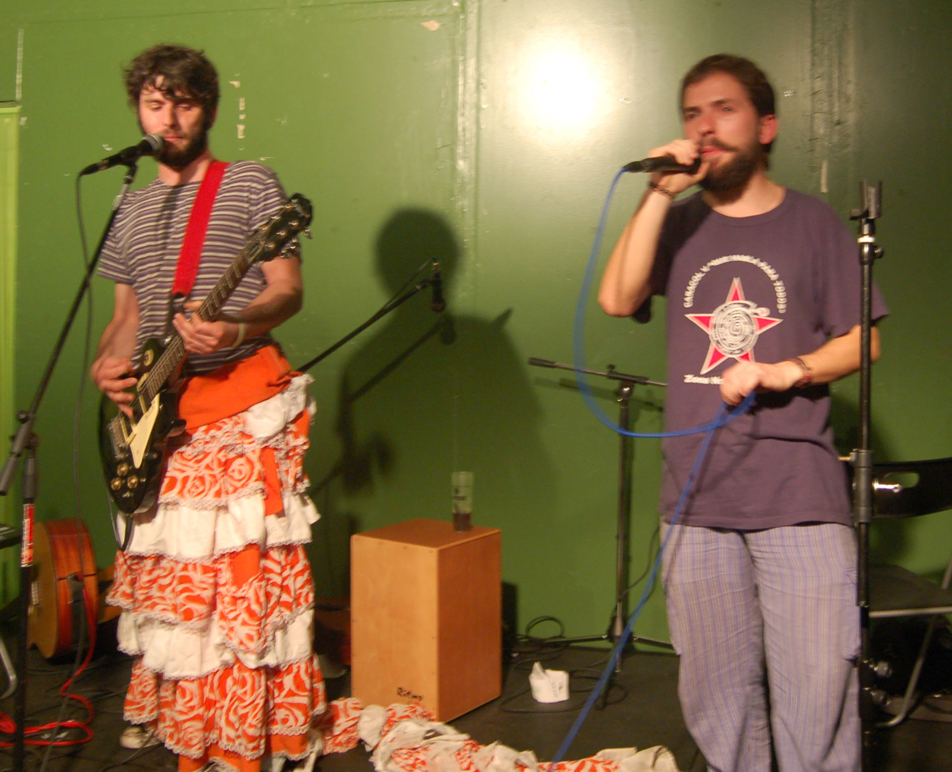 Concerto de Labregos do tempo dos Sputniks na Gentalha do Pichel en Santiago de Compostela